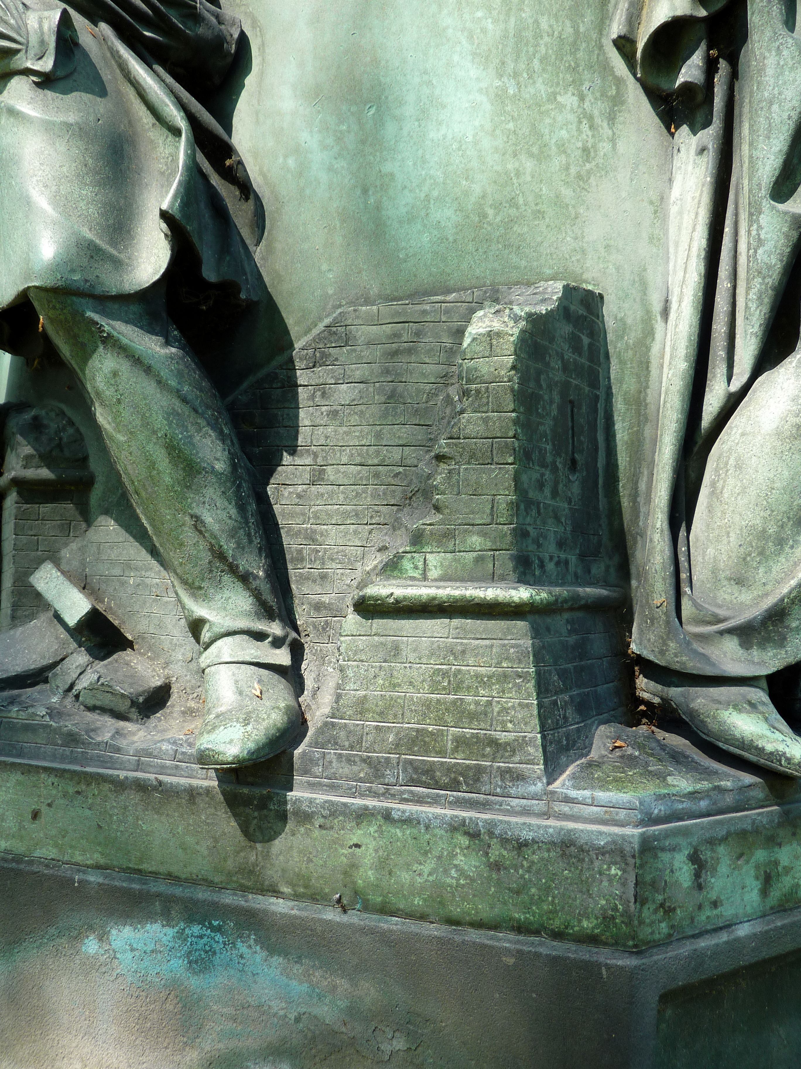 Detail des Denkmals für Jakob Guiollett (deutscher Beamter und Politiker, 1746–1815), Initiator und Baumeister der Wallanlagen in Frankfurt am Main. Das Detailfoto zeigt einen Ausschnitt von Darstellungen der Schleifung der Frankfurter Stadtbefestigung am Bronze-Sockel des 1837 von Eduard Schmidt von der Launitz gestalteten Denkmals in Frankfurt.